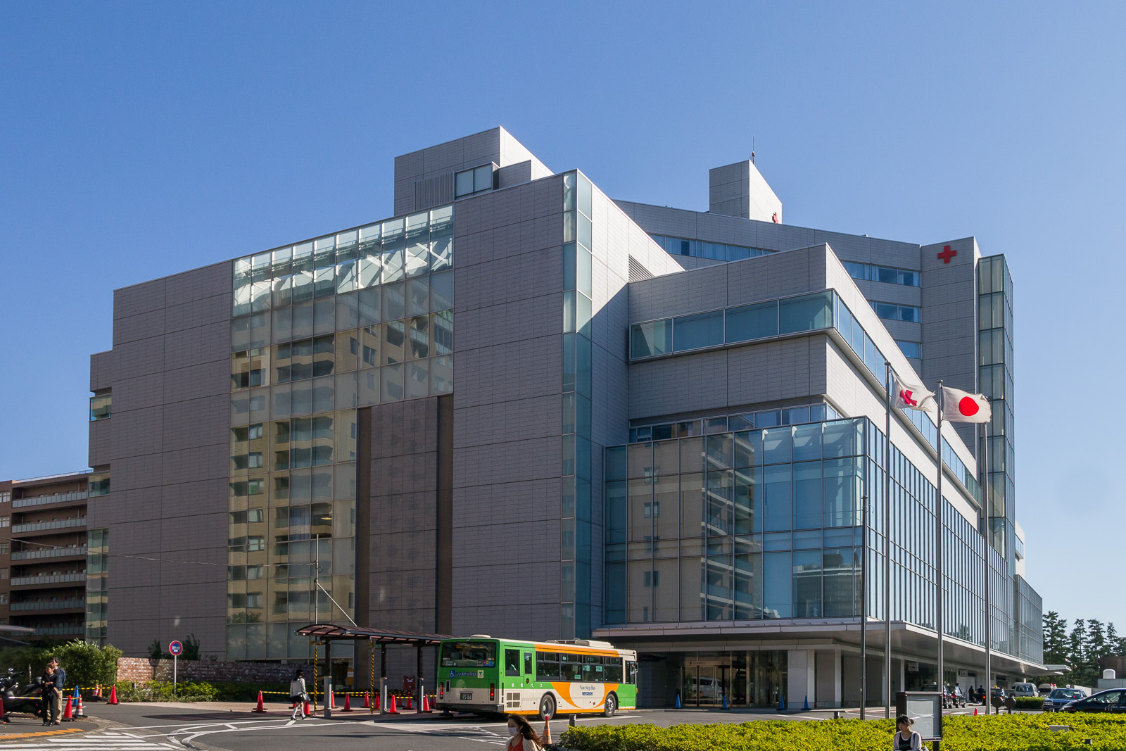 日本赤十字社医療センター、東京都渋谷区広尾。